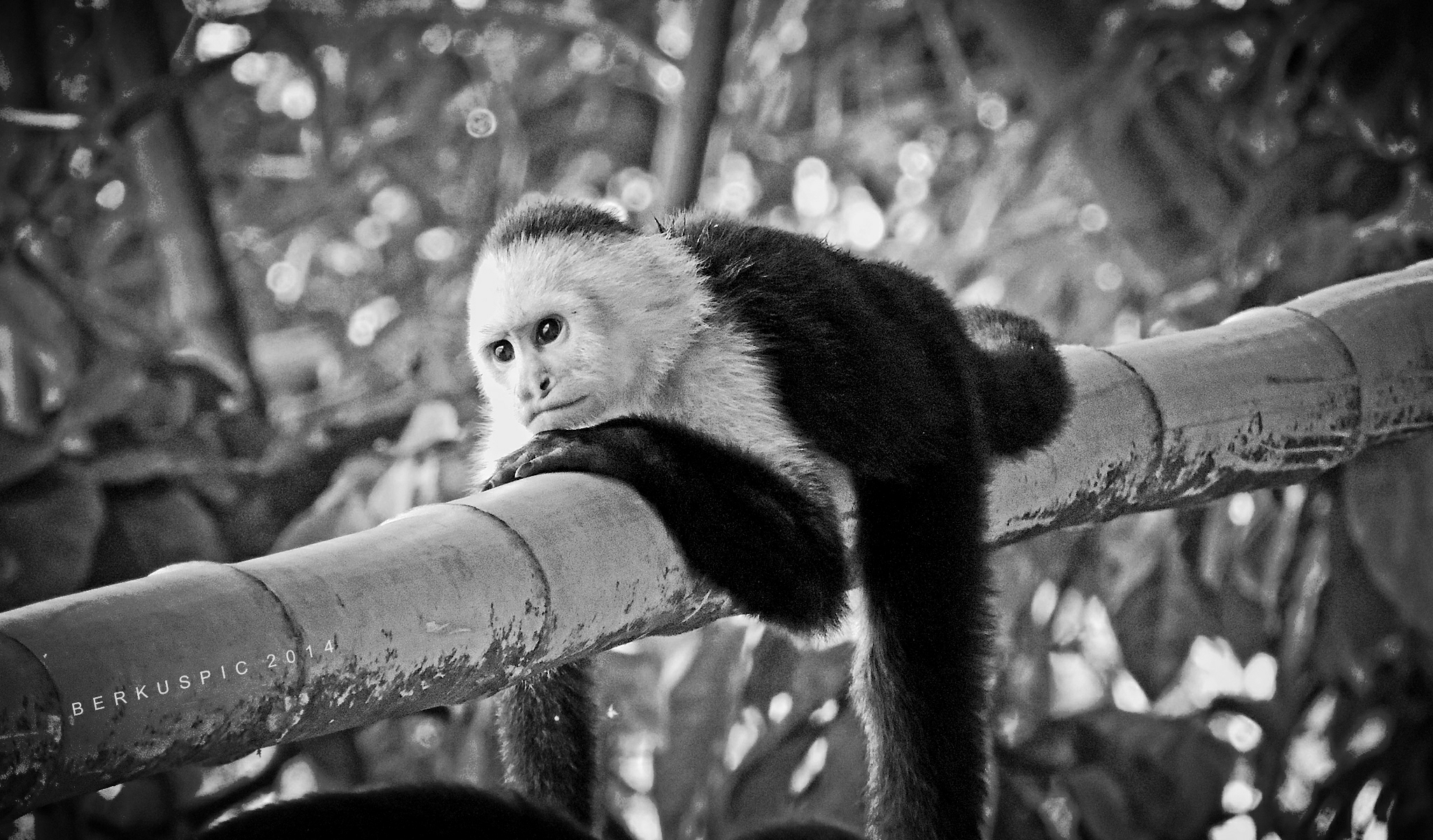 "cebus capucinus" Dominicalito, Costa Rica.